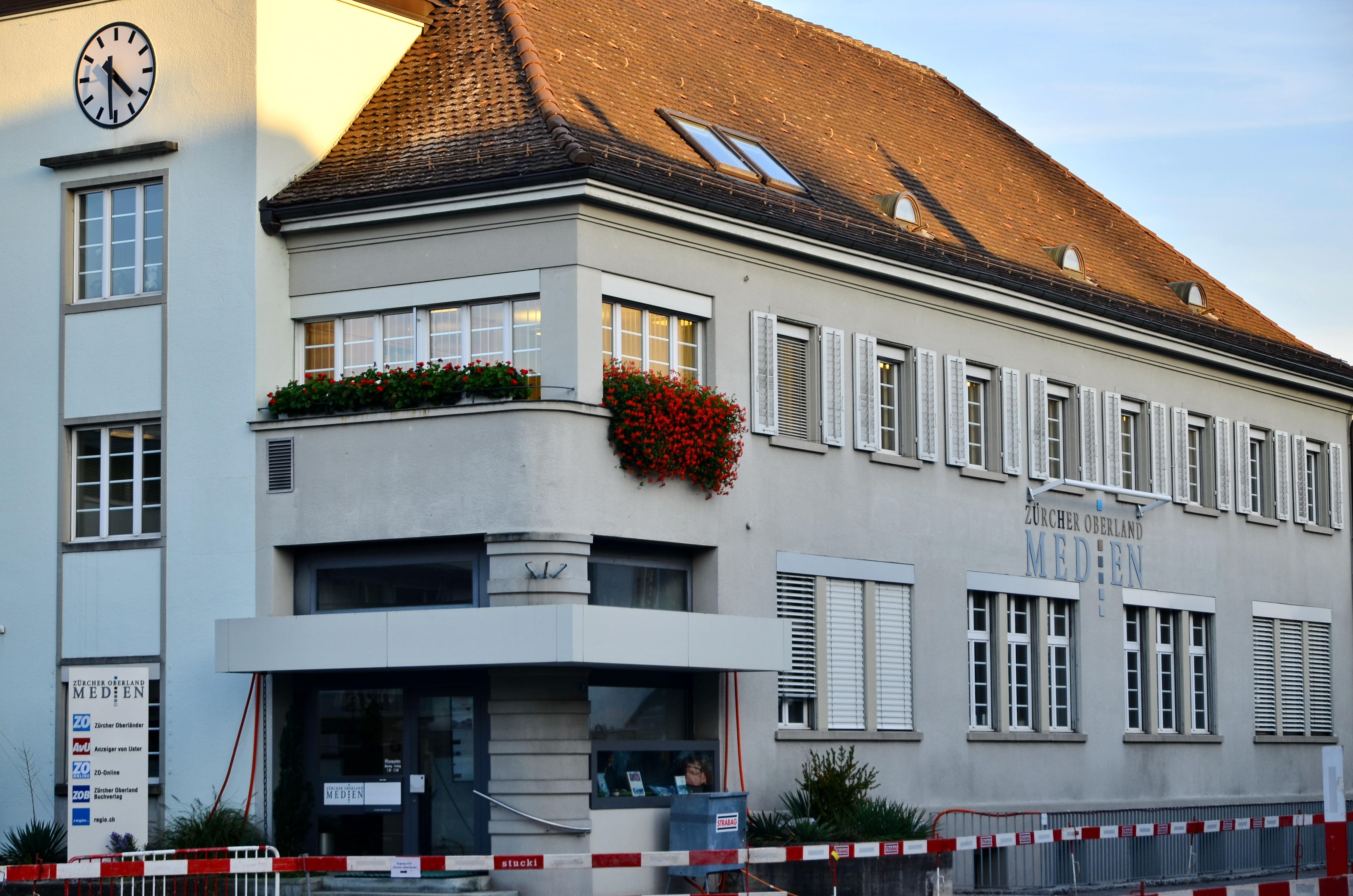 Zürcher Oberländer, Rapperswilerstrasse 1 in Wetzikon (Switzerland)